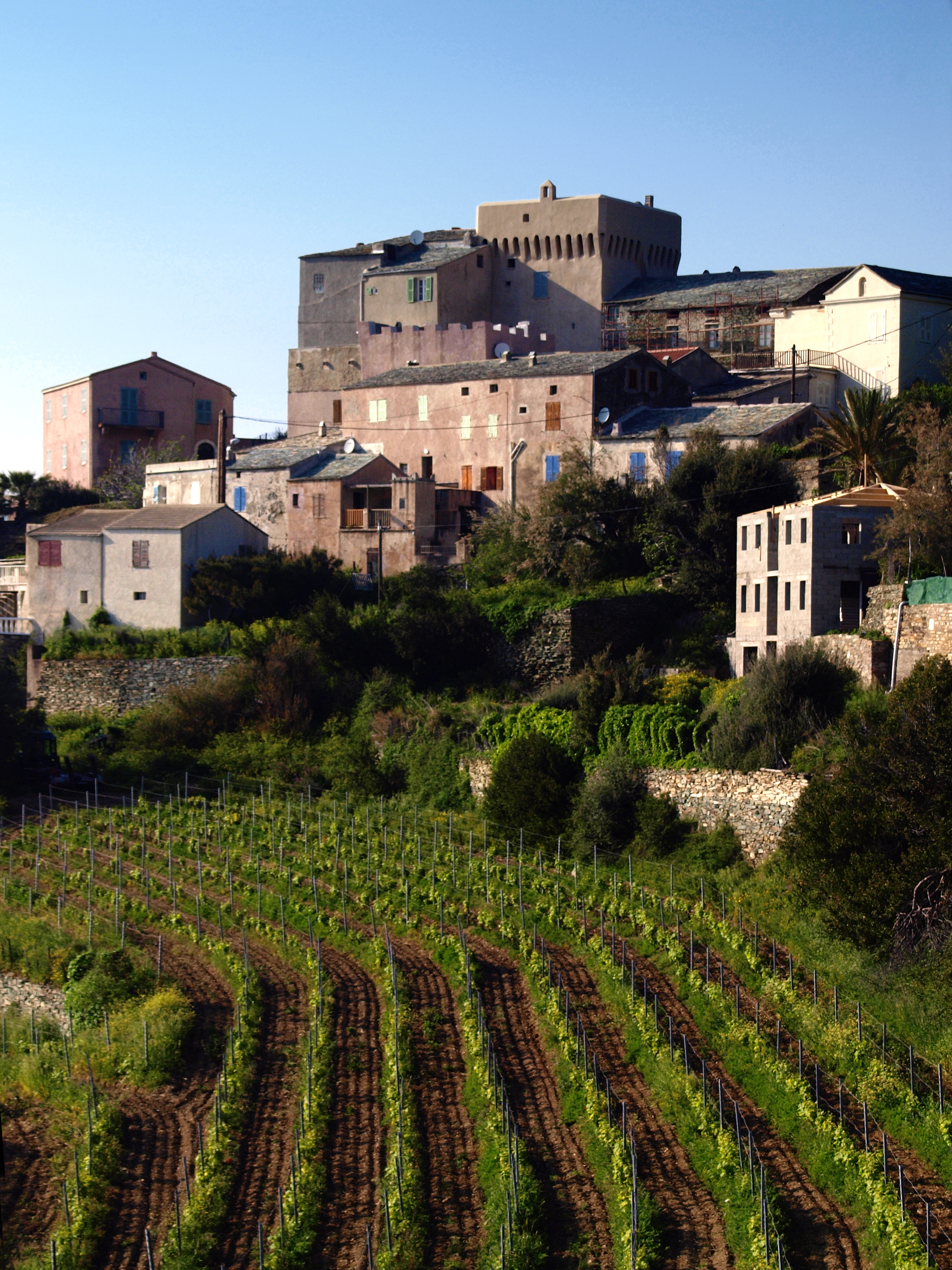 Morsiglia (Corsica) - Stanti